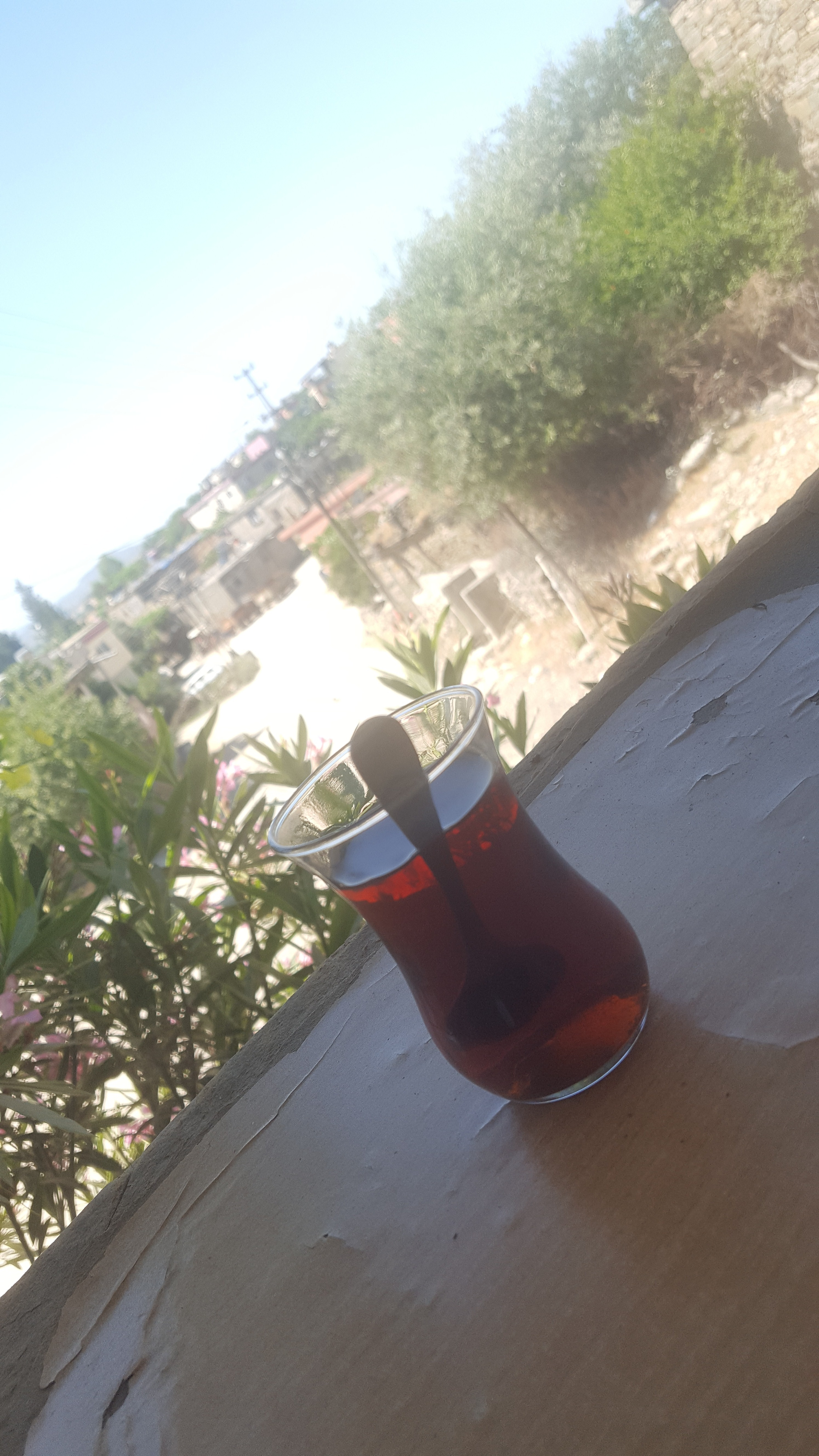 Köy Kahvehanesinden